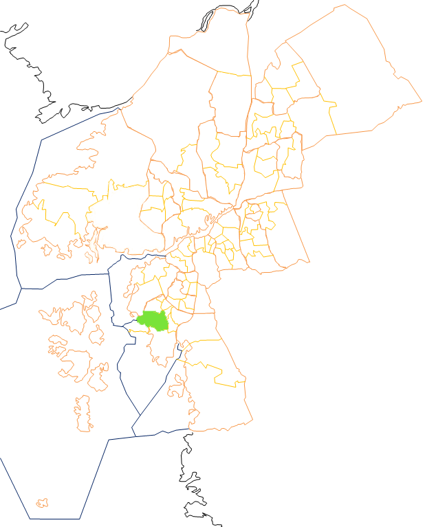 Karta som visar primärområdes belägenhet i Göteborg